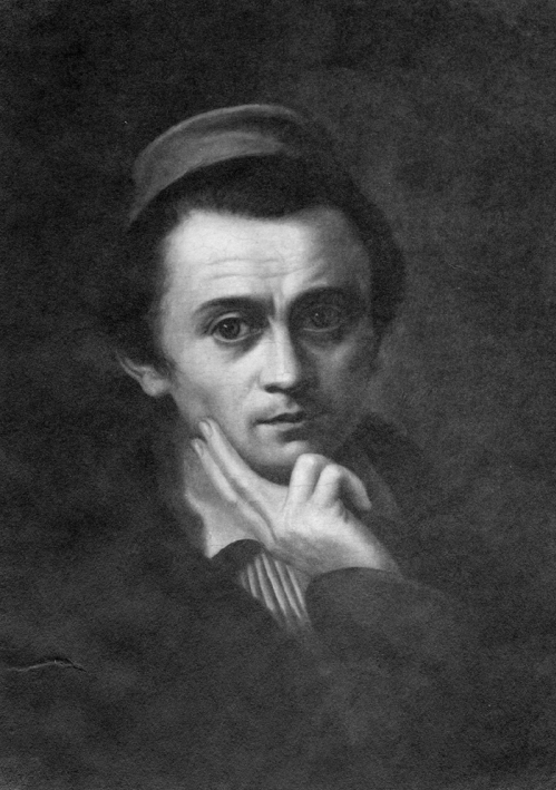 Selbstbildnis. Öl